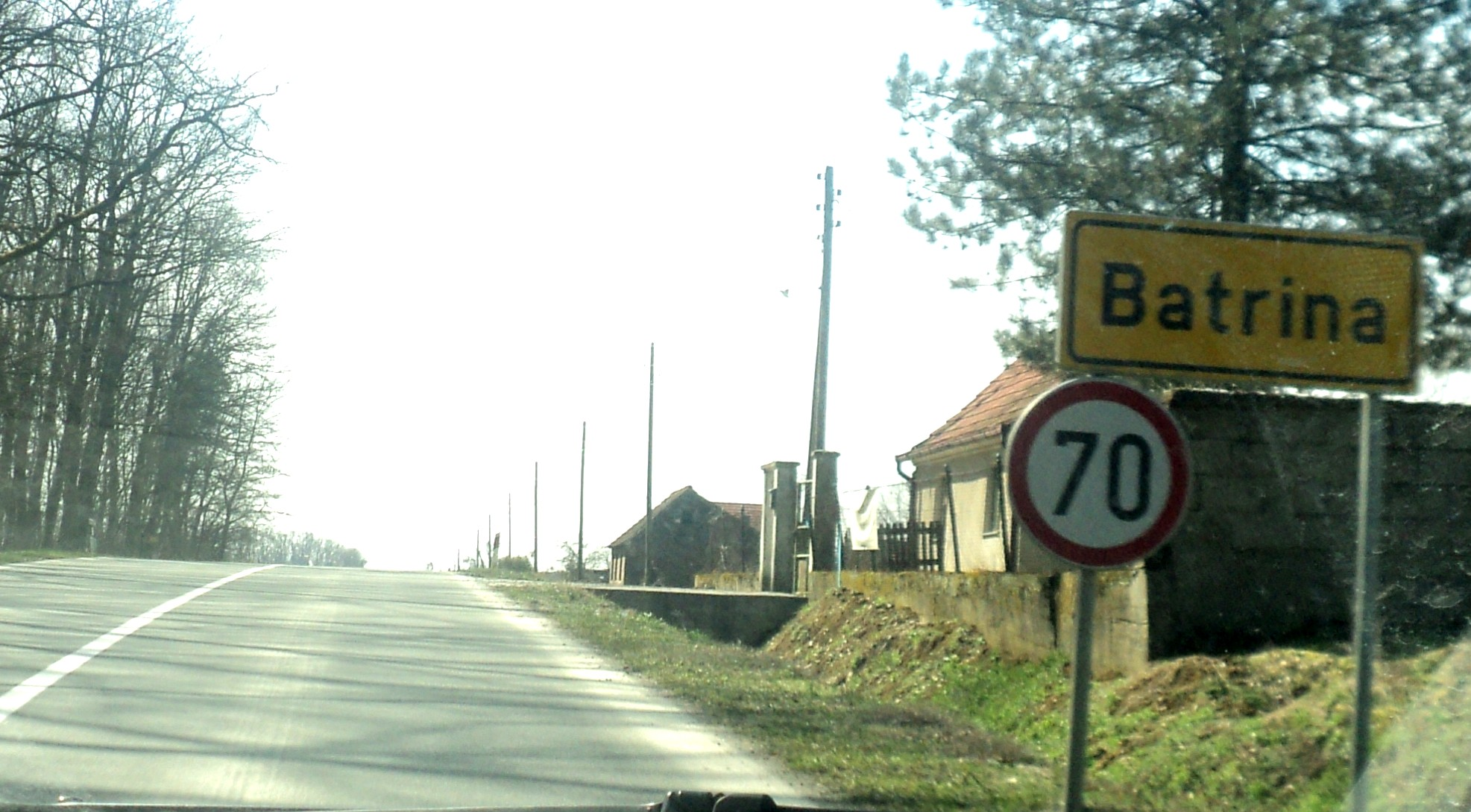 Ulazak u Batrinu od Požege